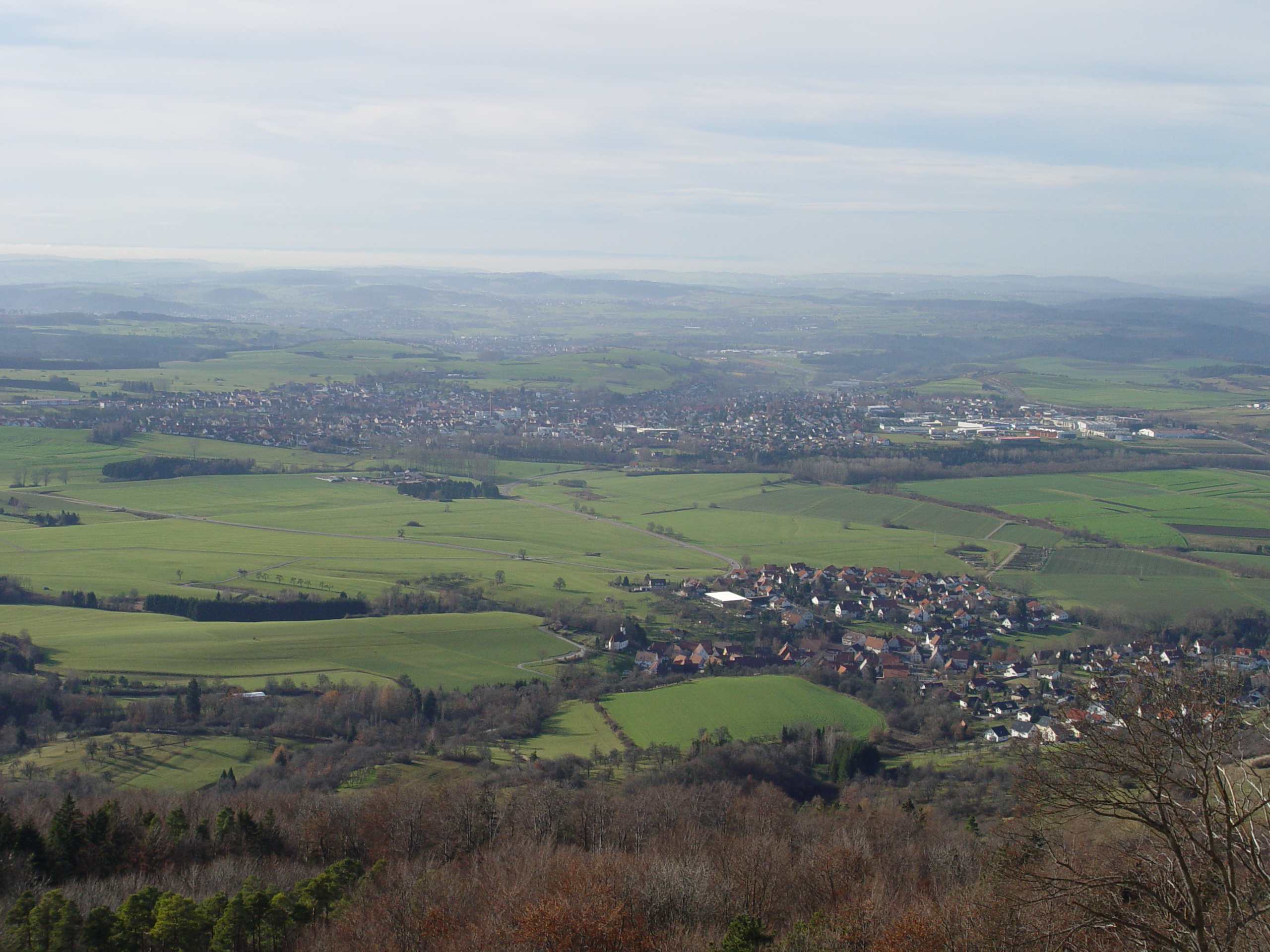 Die Ortschaft Bisingen, gesehen von der Burg Hohenzollern aus, im Vordergrund Zimmern Bild gemacht am 02.12.2006 own work - Bild selbst gemacht Photographed by: Zollernalb